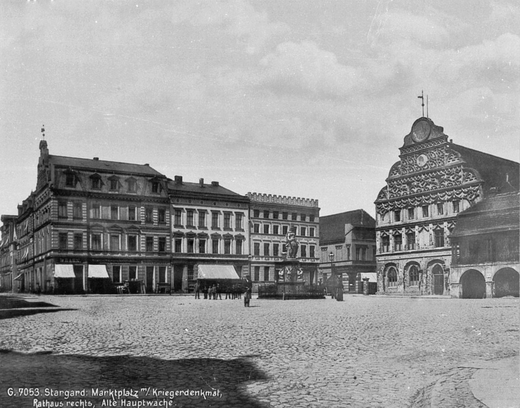 Stargard i/Pom., Marktplatz mit Rathaus, Kriegerdenkmal und Hauptwache